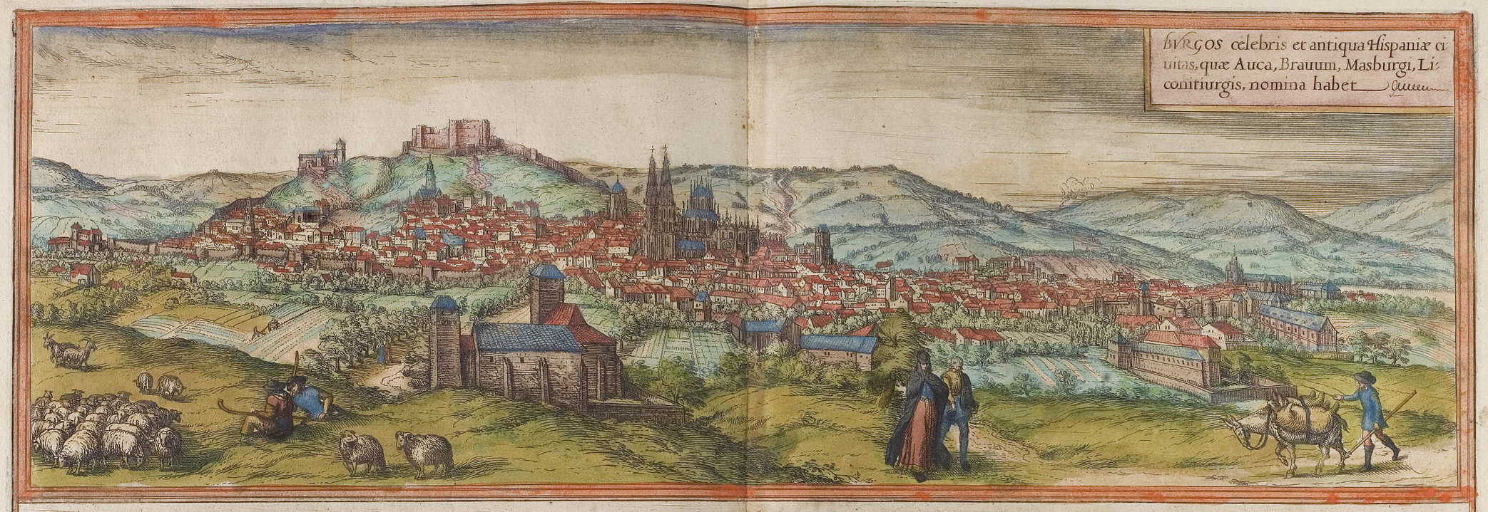 Burgos